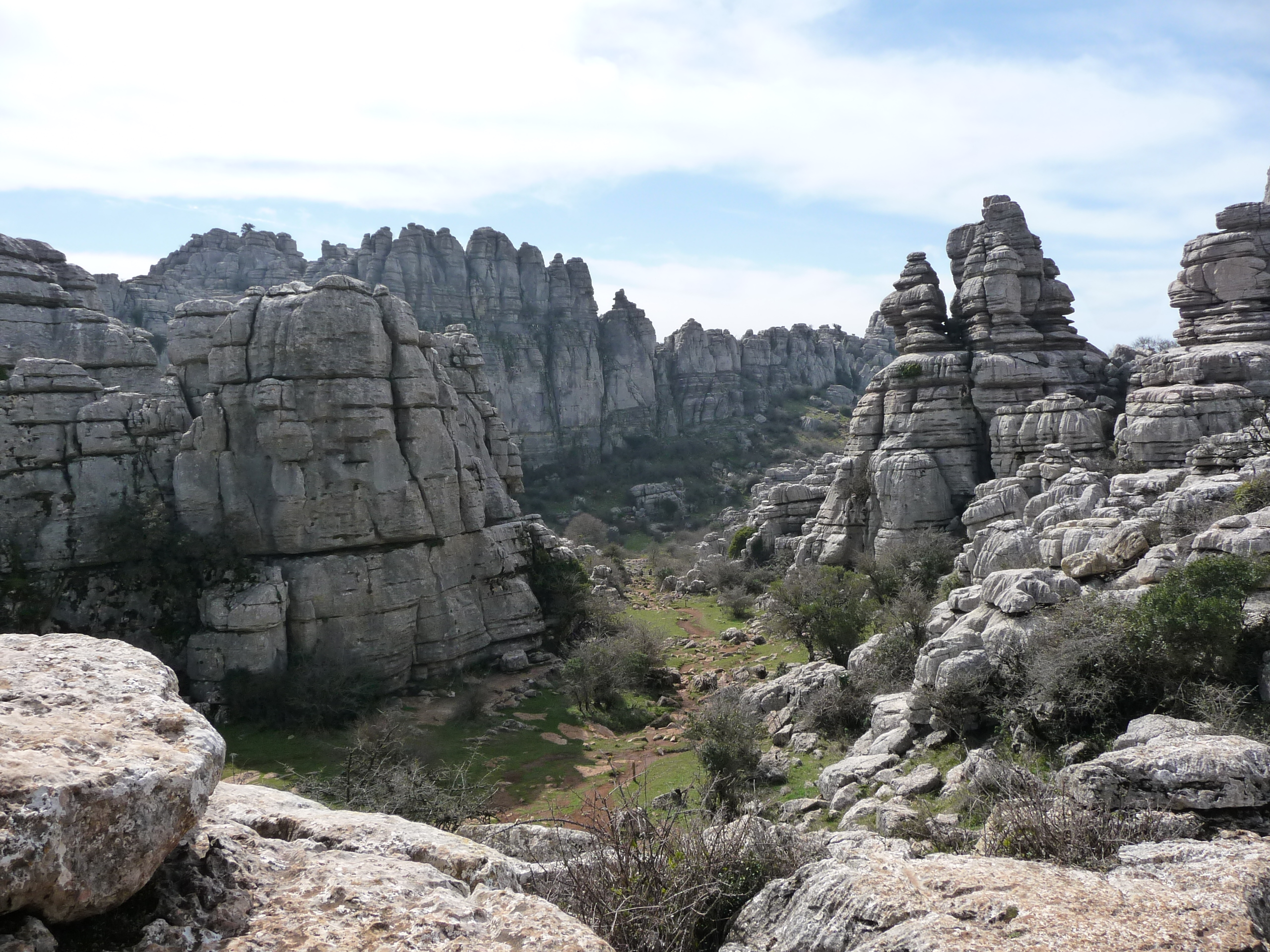 ElTorcal-Antequera-p1010742.jpg